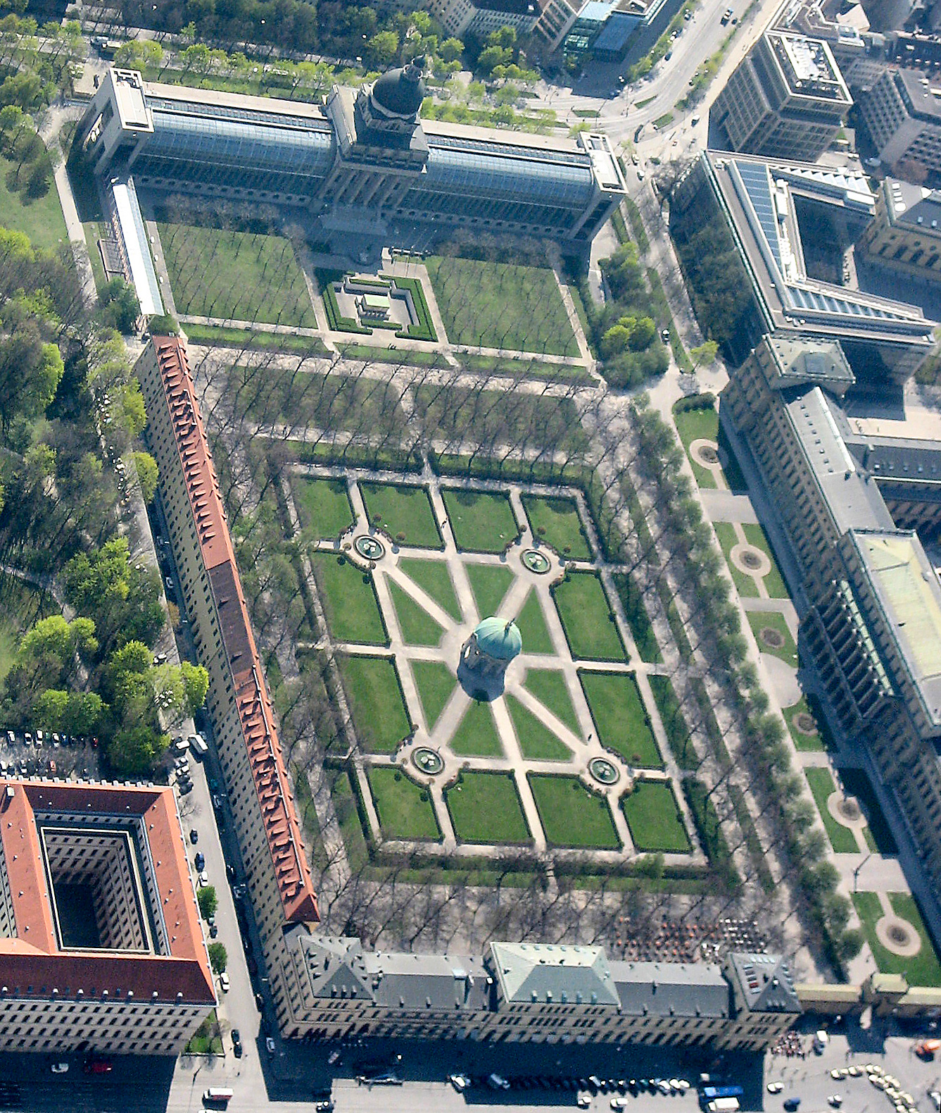 Luftbild des Hofgartens der Münchener Residenz